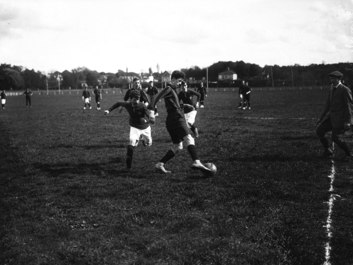 25 avril 1909, Stade helvétique de Marseille contre Cercle athlétique de Paris, finale du Championnat de France USFSA à Colombes.